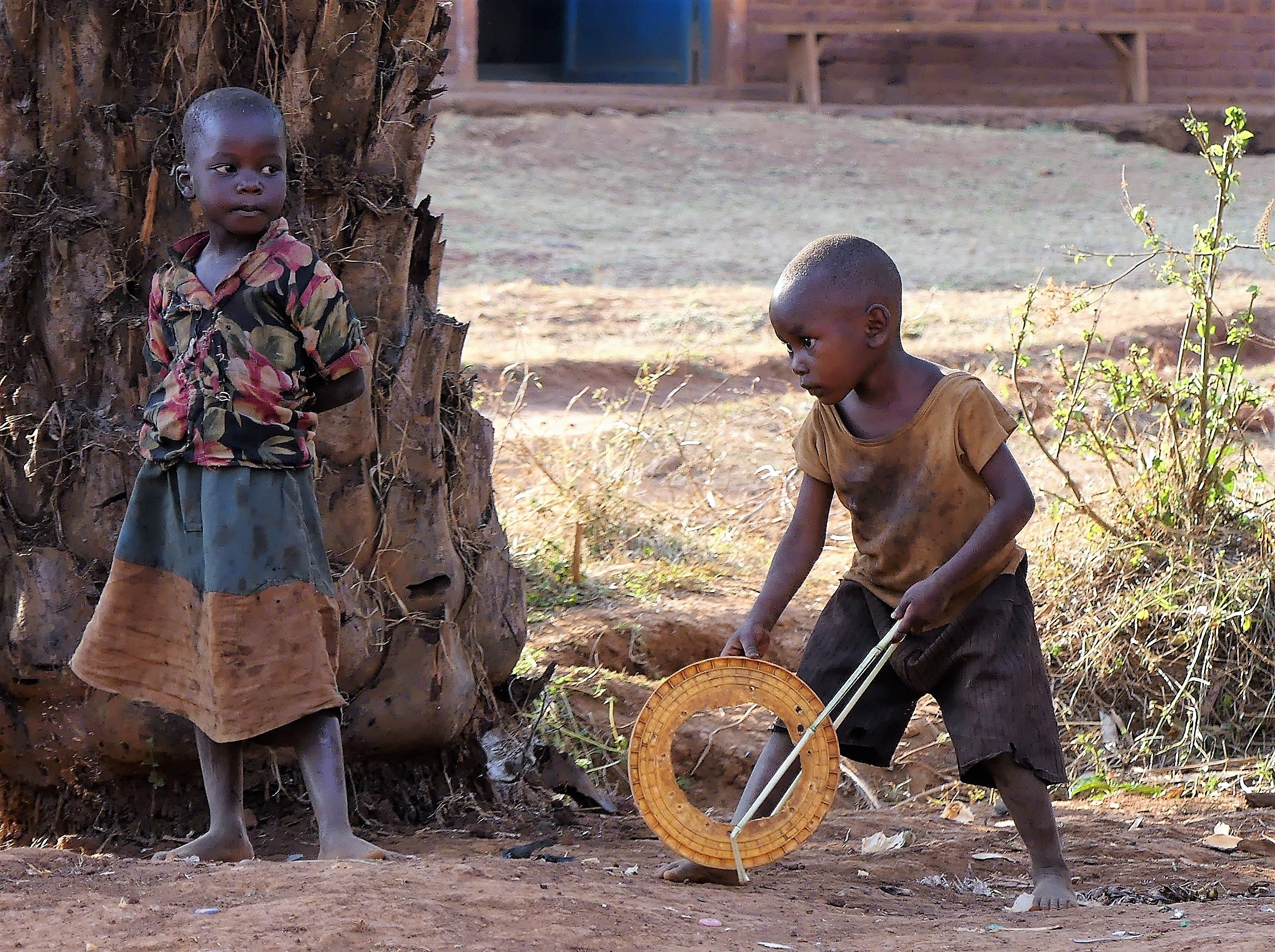 Los niños inventan sus propios juegos con el material que encuentran, This is an image with the theme "Play" from: Burundi